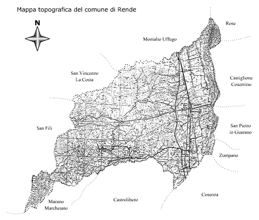 Mappa del comune di Rende